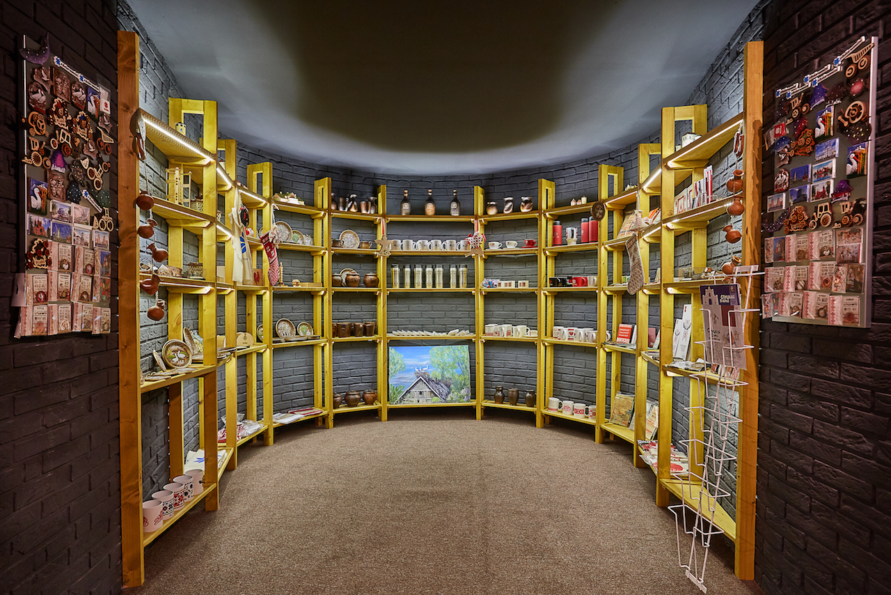 Сувенирная лавка музея с большим выбором подарков от лучших белорусских мастеров.